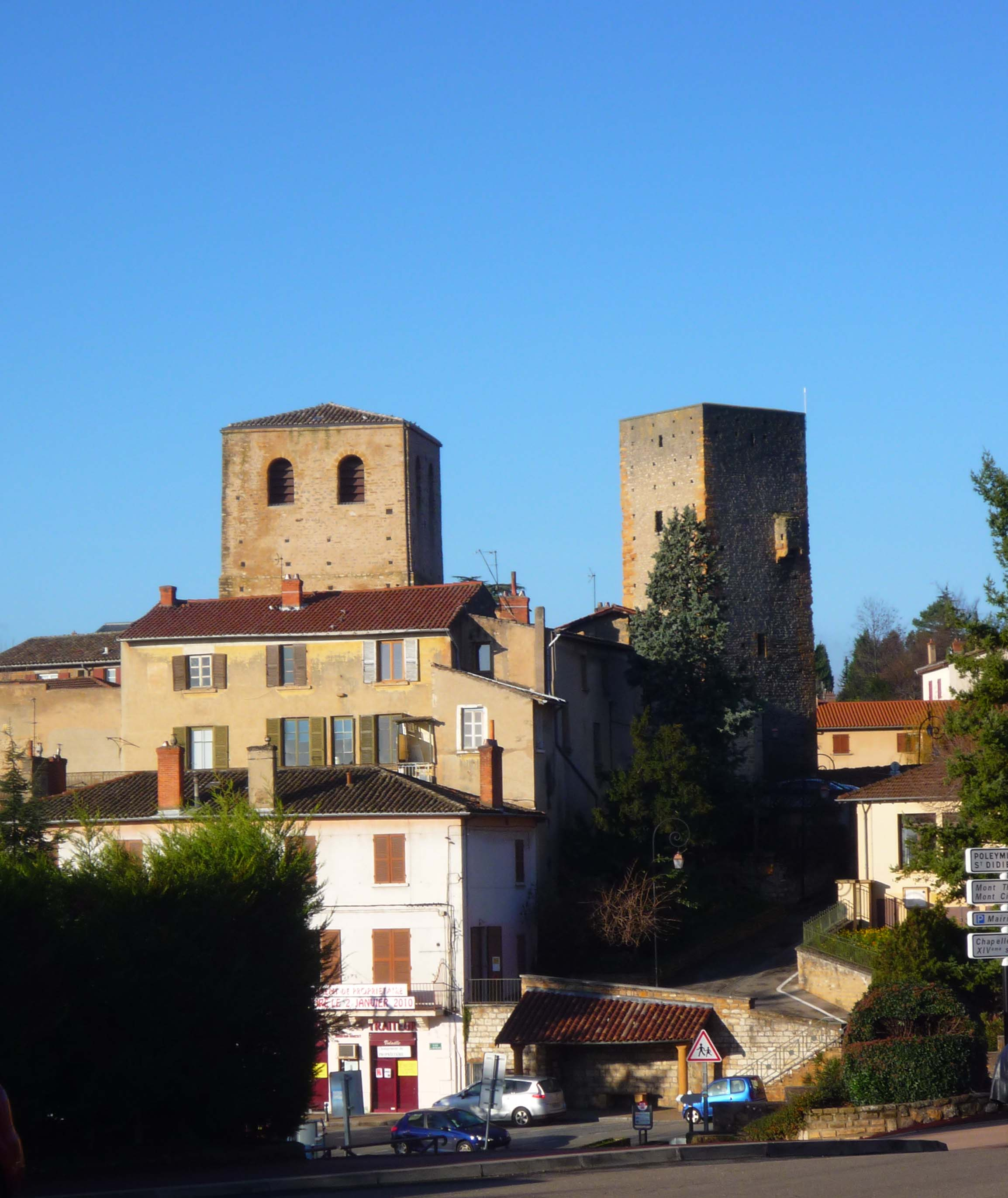 Le bourg de Saint-Cyr-au-Mont-d'Or village de la banlieue lyonnaise